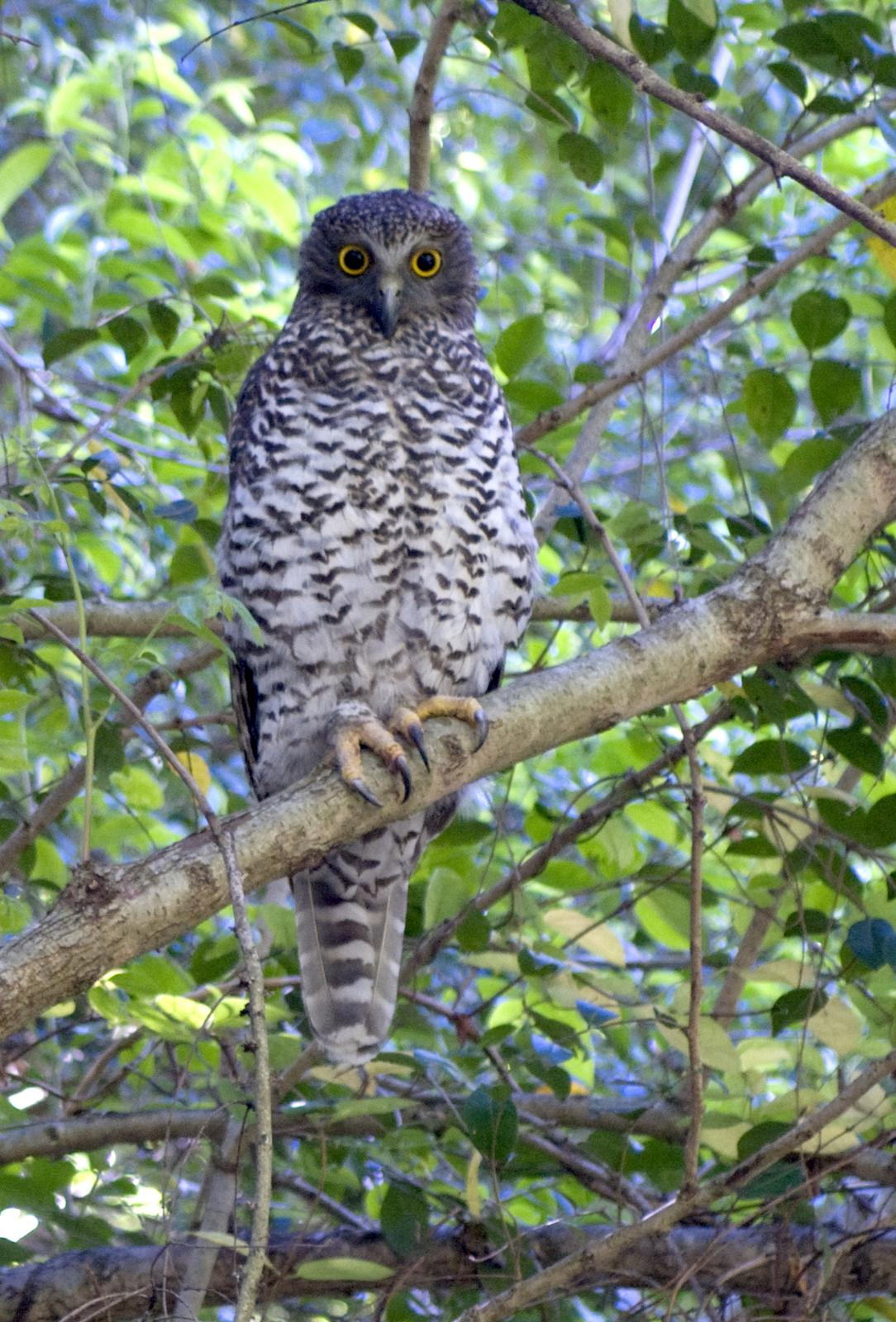 Powerful Owl